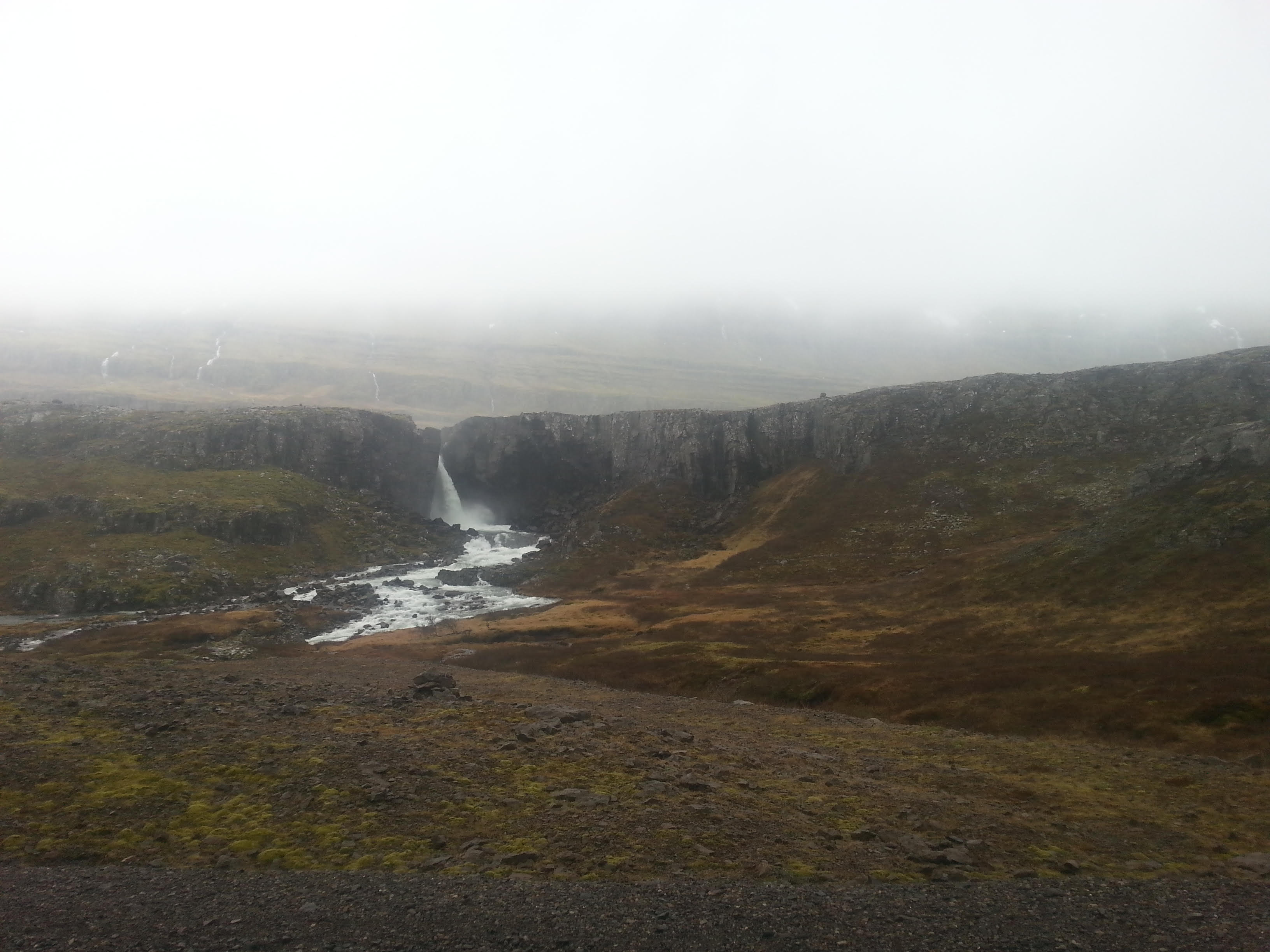 Seyðisfjörður, salto de auga. Maio 2014.